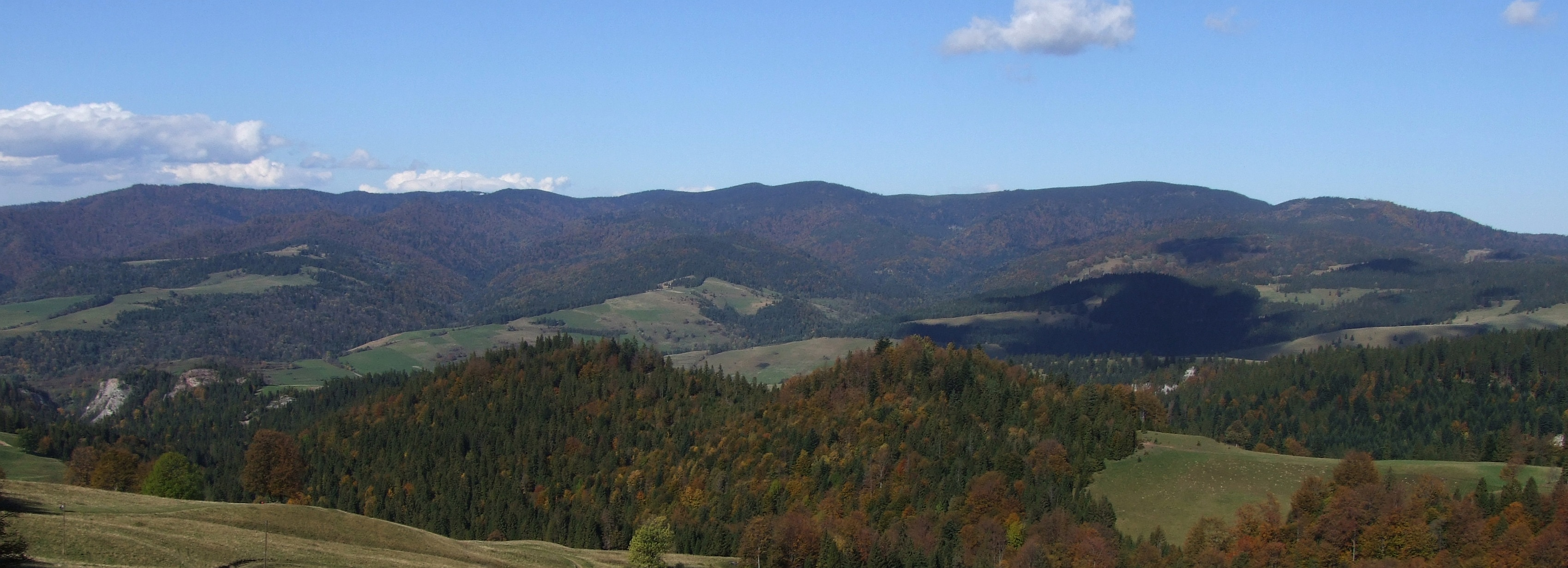 Pasmo Radziejowej, widok spod Wysokich Skałek w Małych Pieninach. W dole Wąwóz Homole i Pawłowska Góra